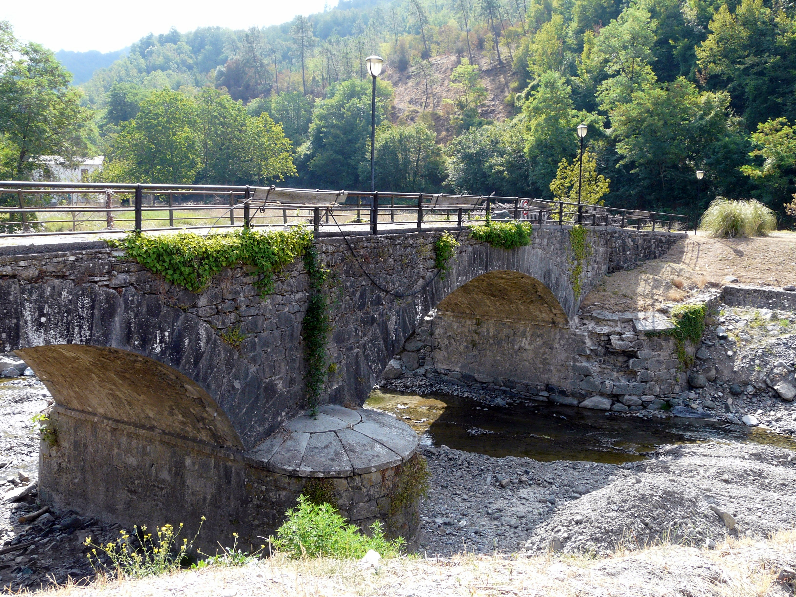 Ponte presso Rocchetta di Vara, Liguria, Italia